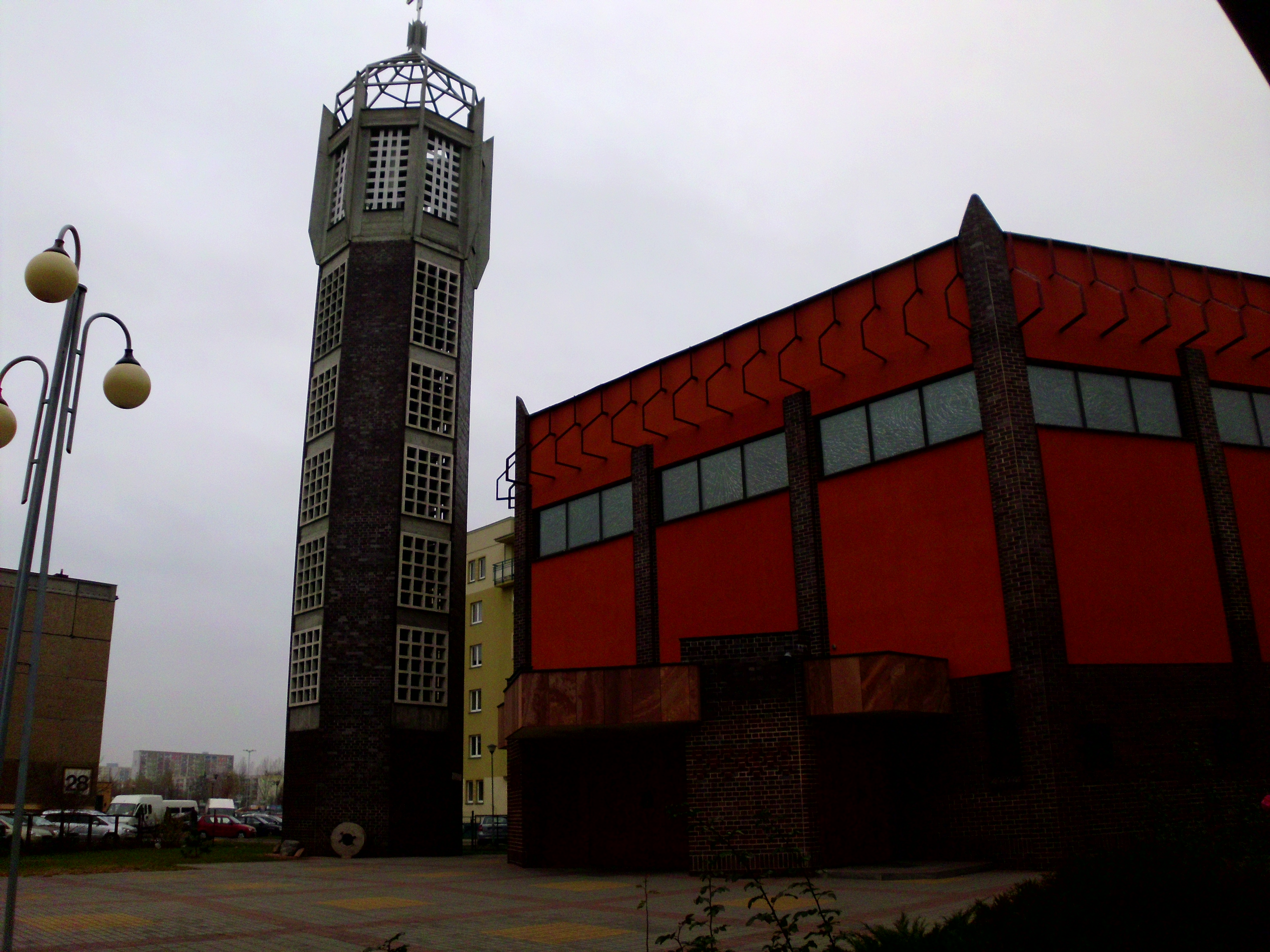 Kościół parafii Narodzenia Pańskiego